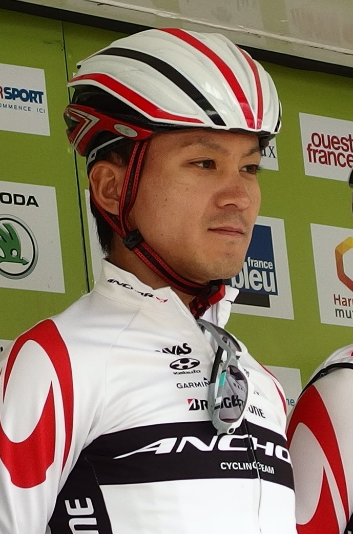 Tour de Bretagne 2015 - Présentation des équipes au départ de la troisième étape à Baud - Équipe Bridgestone Anchor Depicted person: Kōhei Uchima